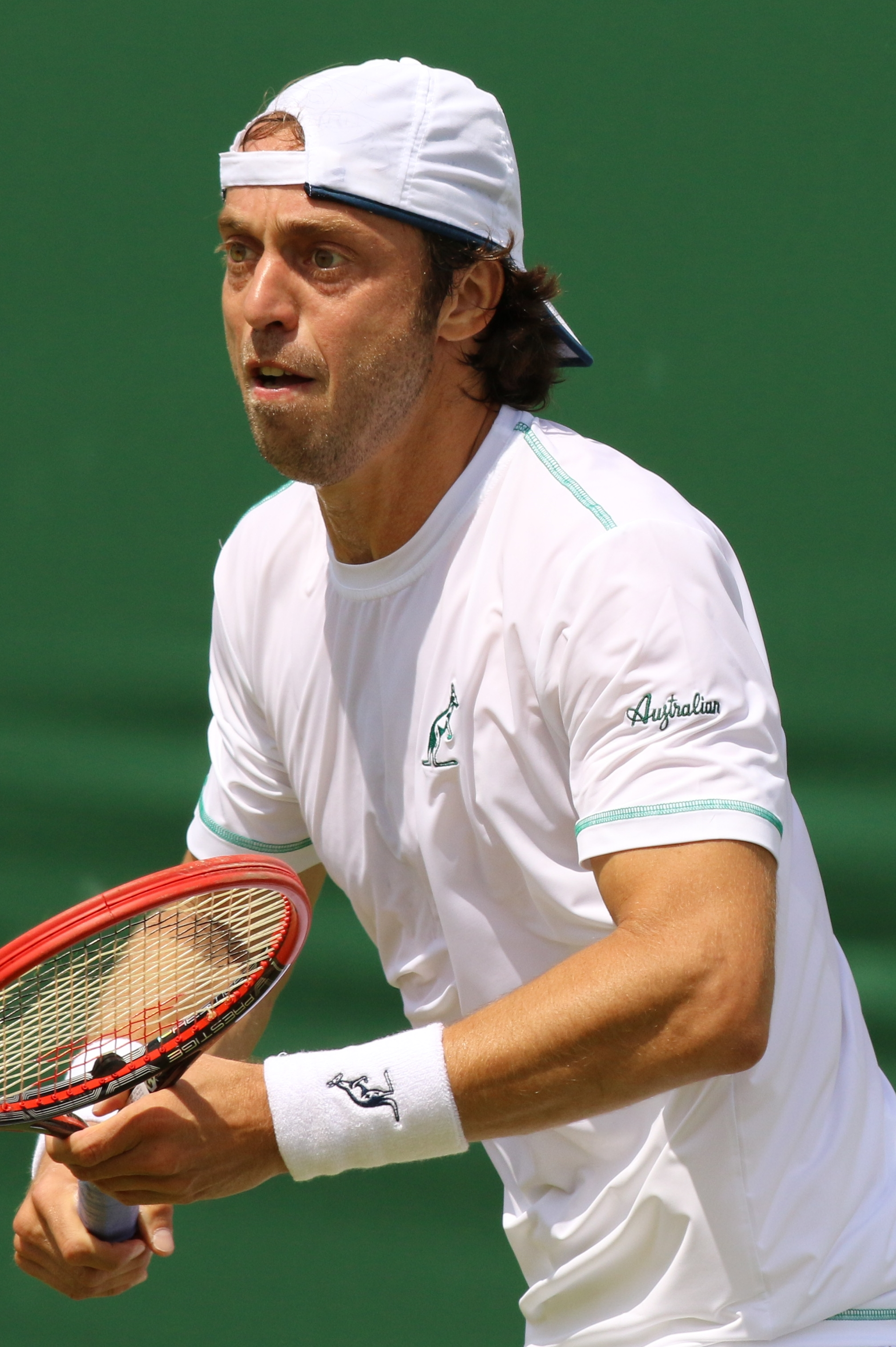 Lorenzi WM16 (10)